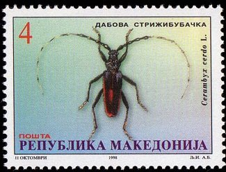 Cerambyx cerdo